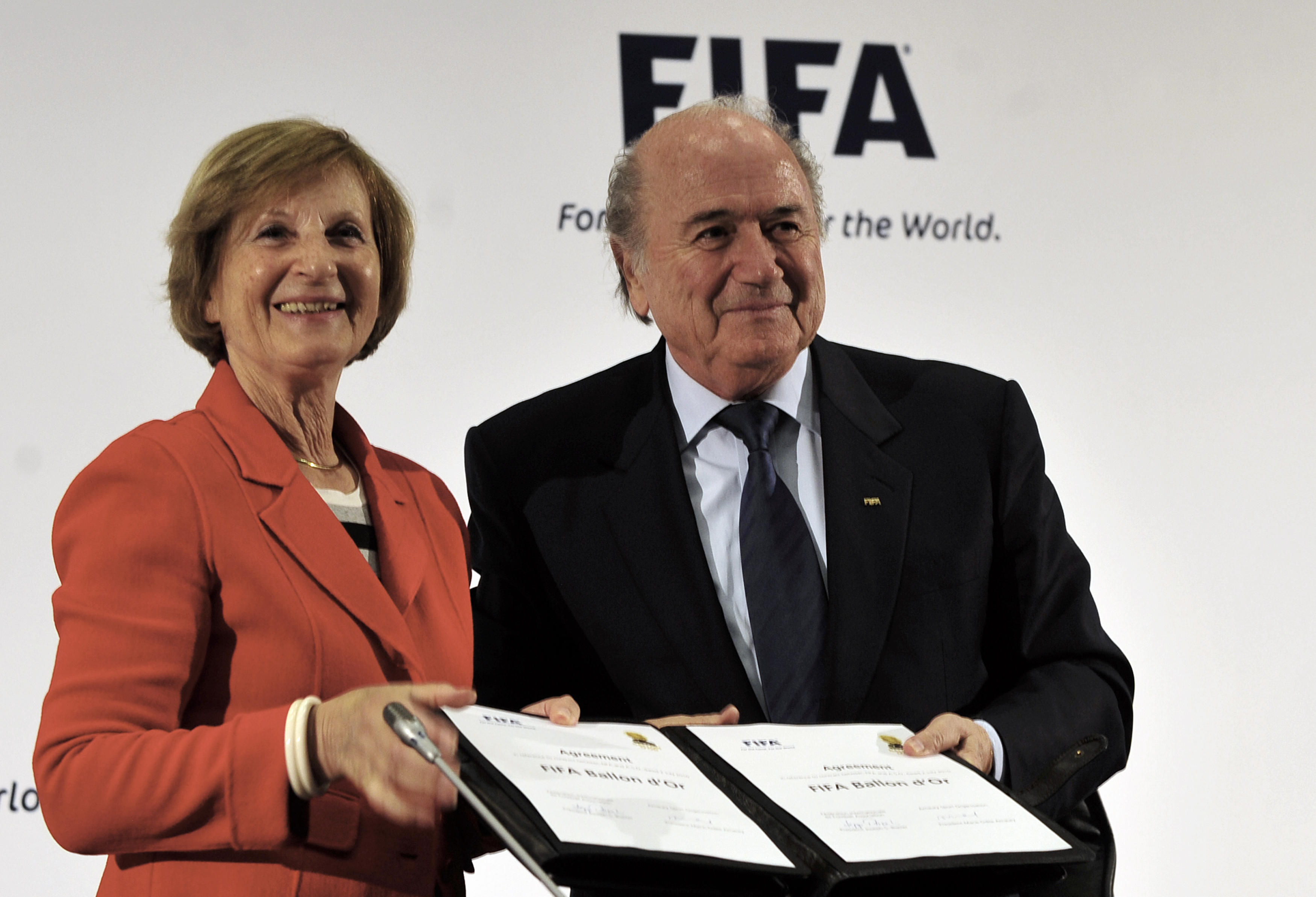 Joanesburgo (África do Sul) - Marie-Odile Amaury, diretora responsável pela edição da France Football, e o presidente da Fifa, Joseph Blatter, durante evento em que Fifa e a revista France Football asssinaram um acordo para unificar os dois principais prêmios concedidos aos melhores jogadores do mundo.